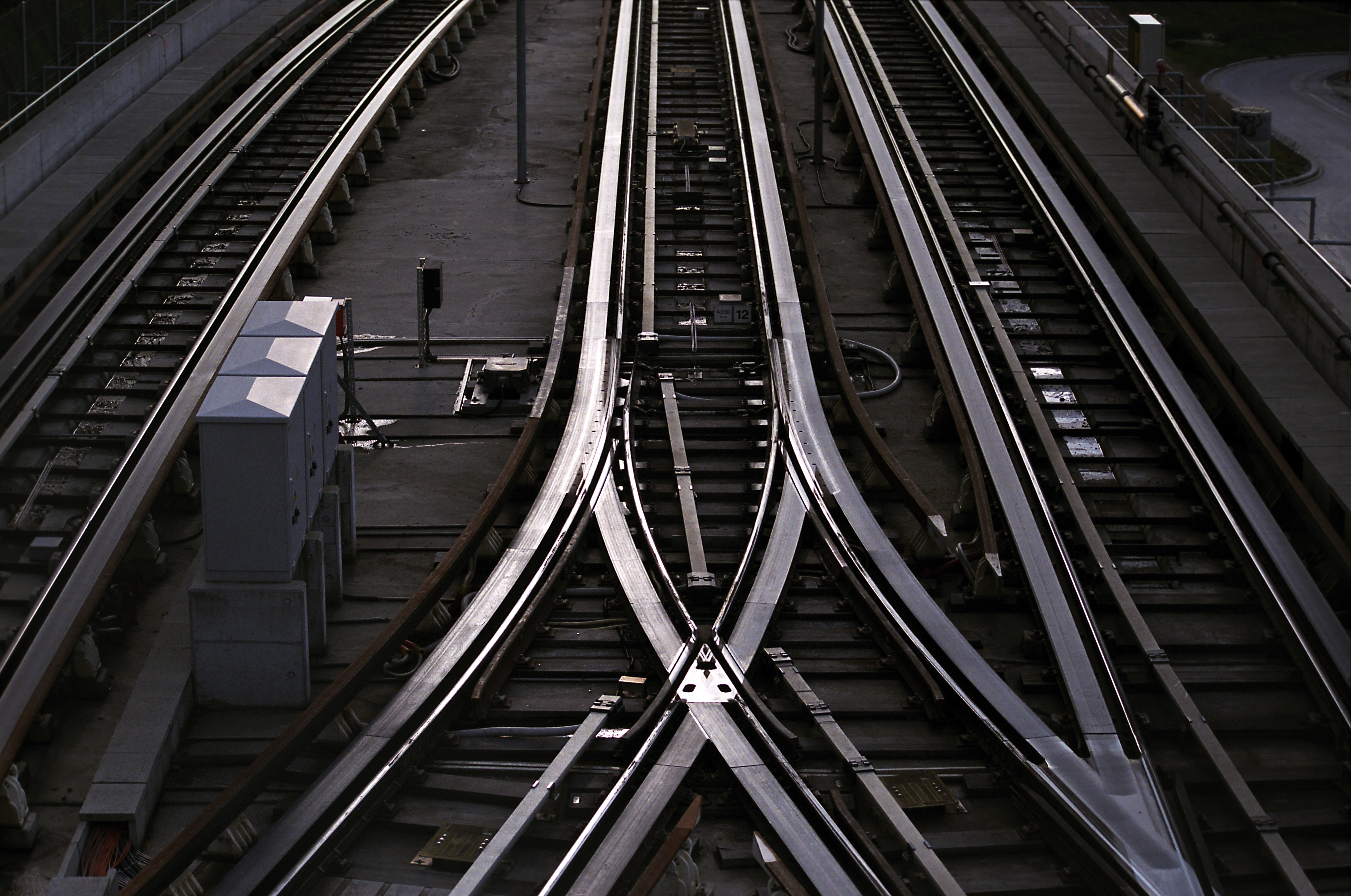 Symmetrische Außenbogenweiche der Métro Lausanne mit zusätzlichen Laufflächen für die Gummireifen. In den Weichen erfolgt die Führung der Wagen durch die überhöhten Spurkränze der innenliegenden regulären Eisenbahnräder.